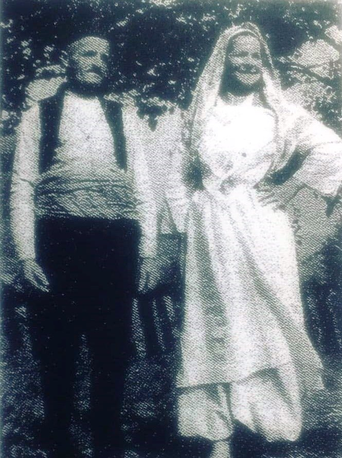 Бошњачка босанска народна ношња двоје Муслимана из Немиле